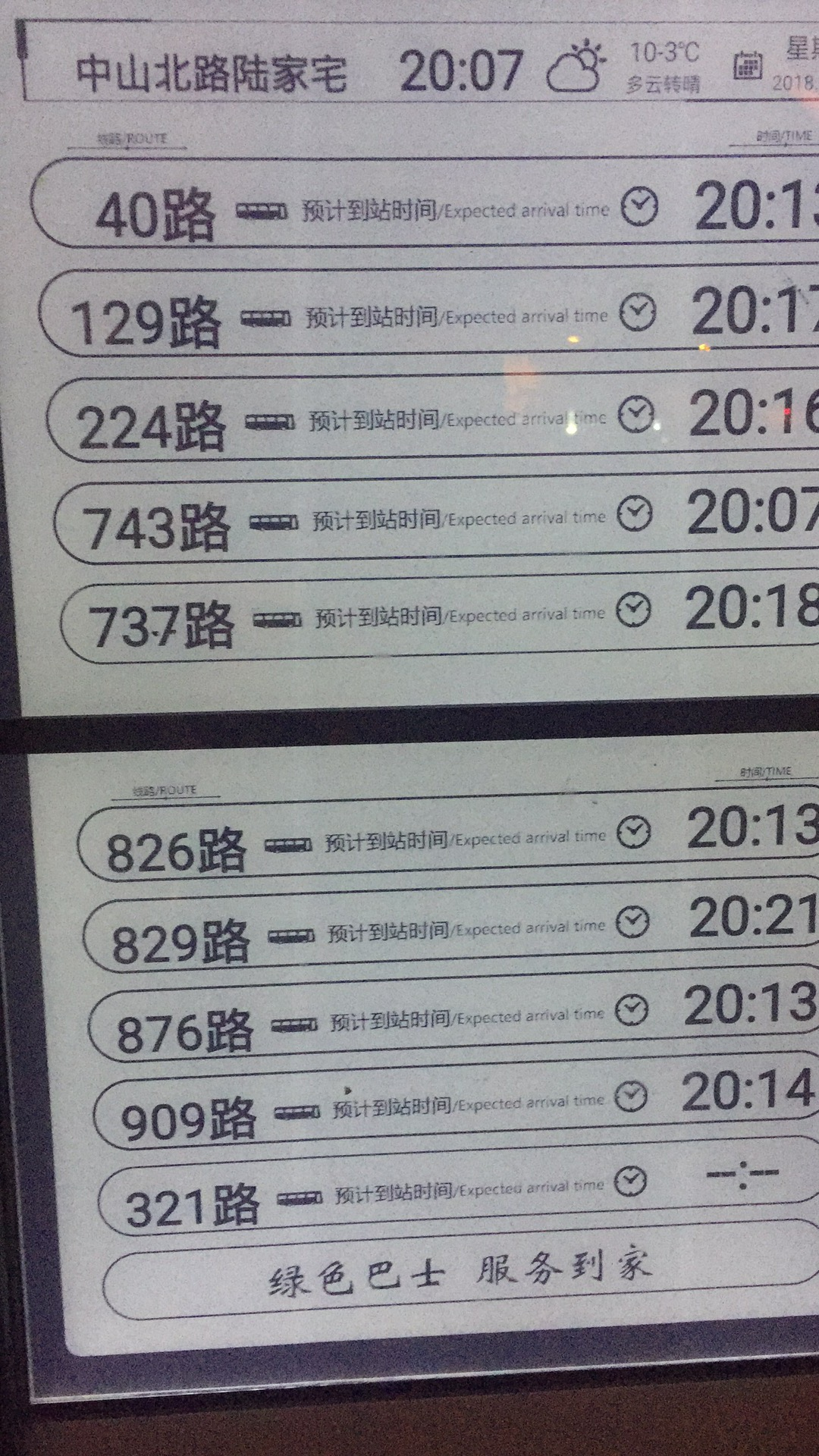 顯示電子屏公交站